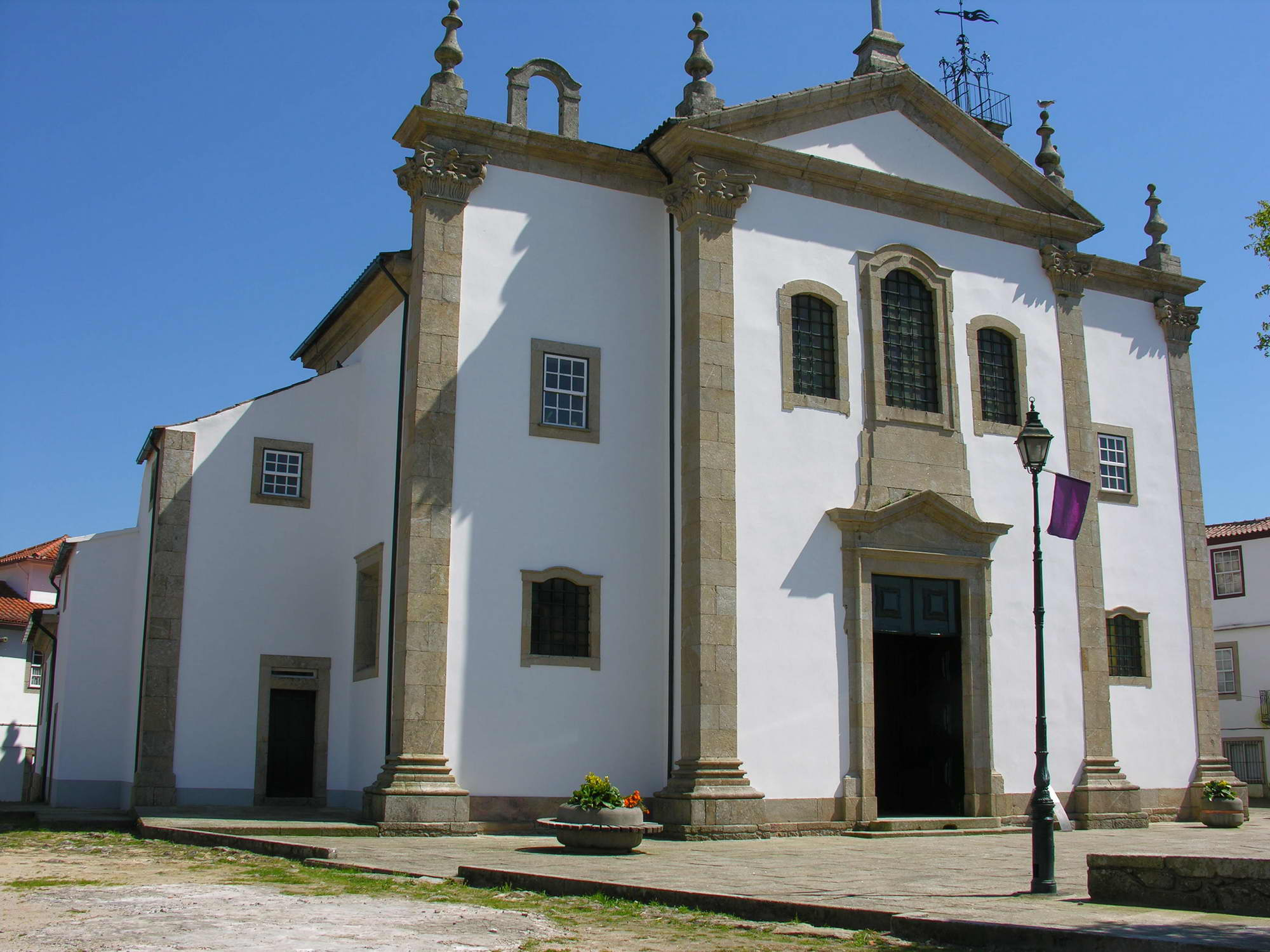 Igrejo de Santo Estevão, Valença, Minho, Portugal